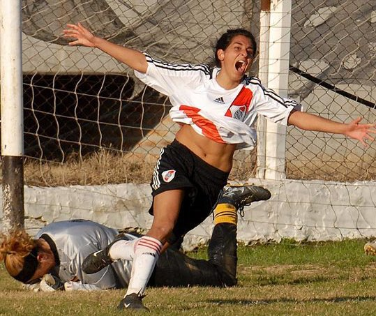 Gol a Boca Juniors final del campeonato 2011, River Campeon River 2 - Boca 0 Goles: Maria Pia Gomez y Emilia Mendieta